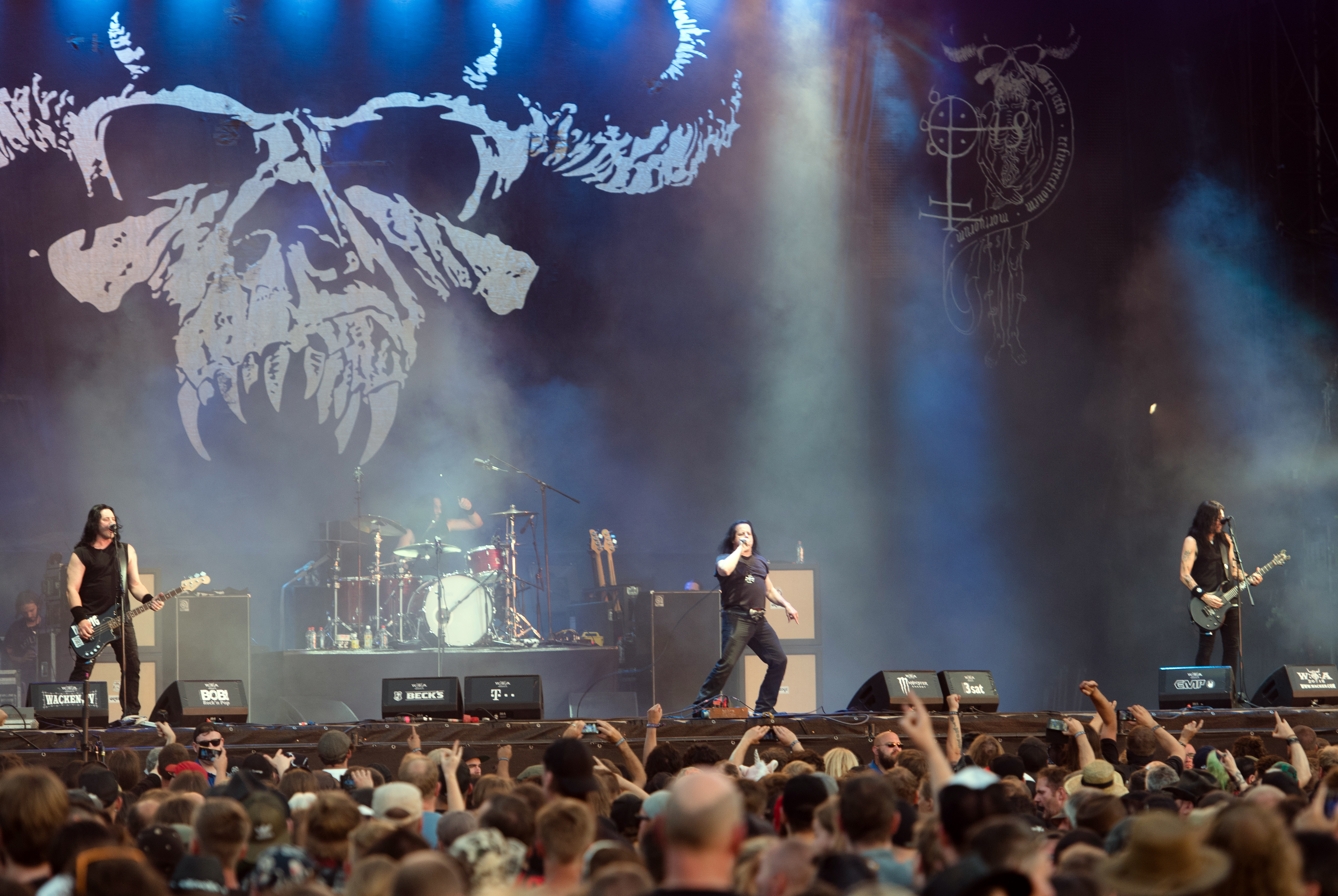 Danzig beim Wacken Open Air 2018